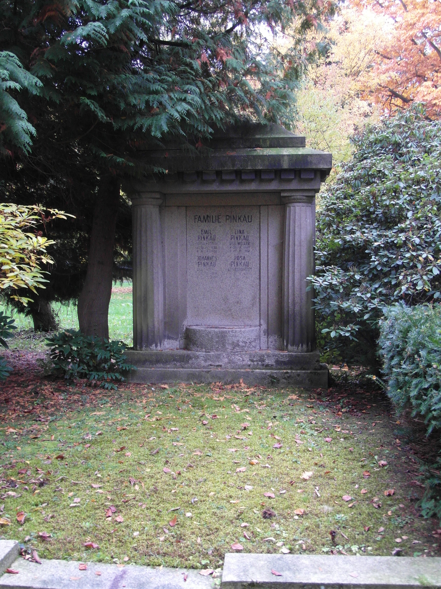 Heutige Grabstätte Familie Emil Pinkau